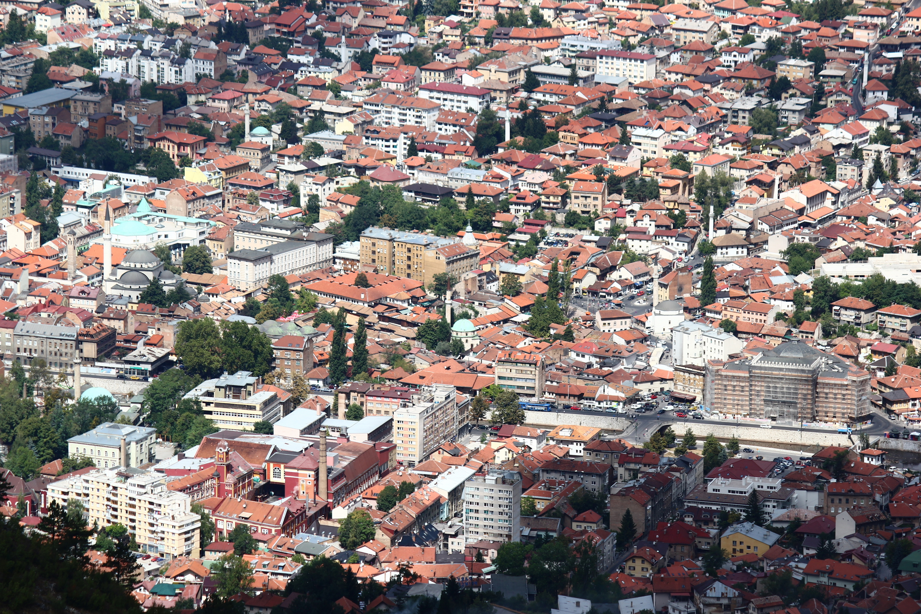 Das historische Stadtzentrum von Sarajevo vom Berg Trebević aus gesehen. Während der Belagerung von Sarajevo wurde der Berg von Heckenschützen und Artillerie der Armee der bosnischen Serben als Stellung genutzt.